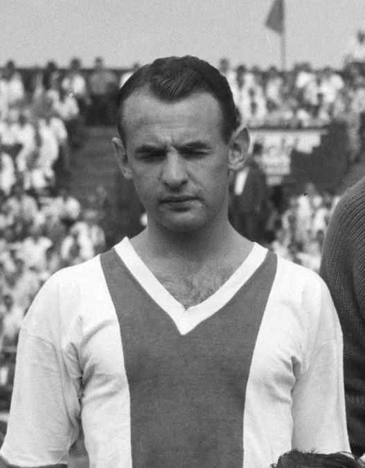 Guus van Ham in 1959.